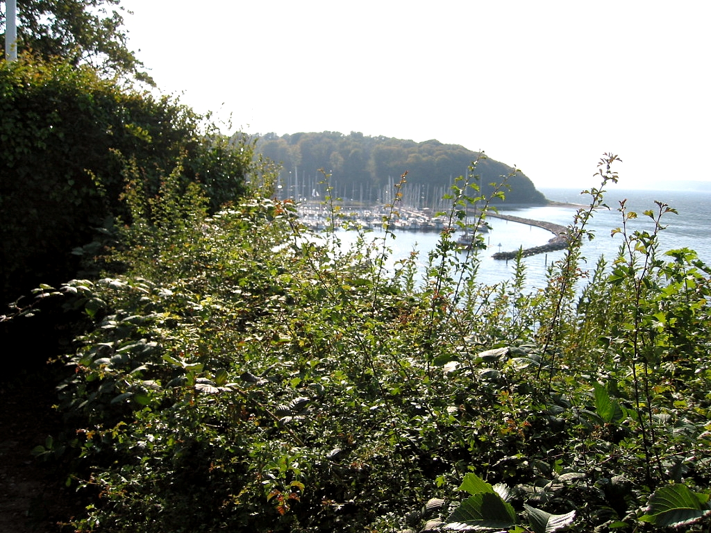 der Glücksburger Yachthafen aufgenommen von Herzog Carls Höhe aus